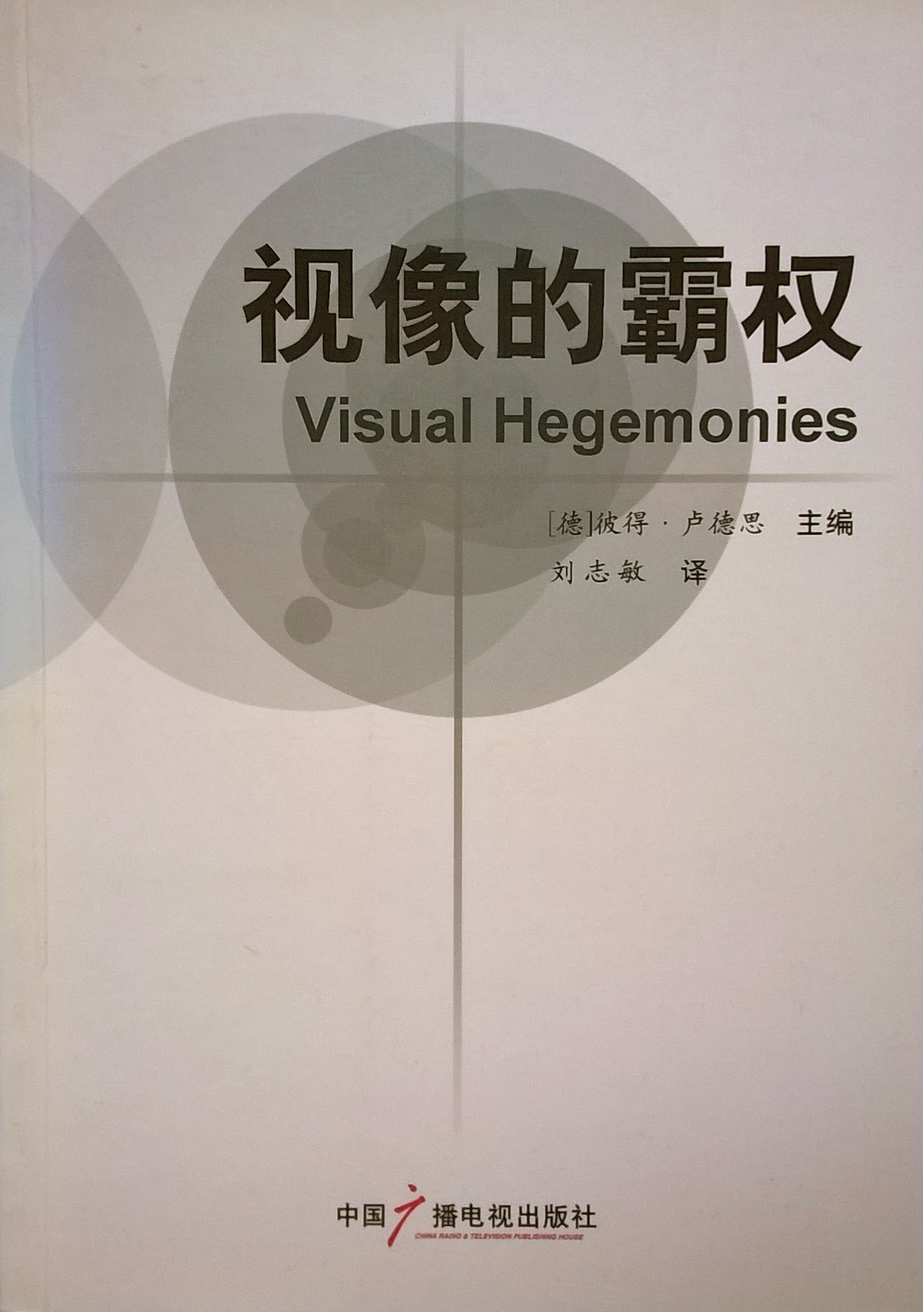 Capa do livro em Mandarim